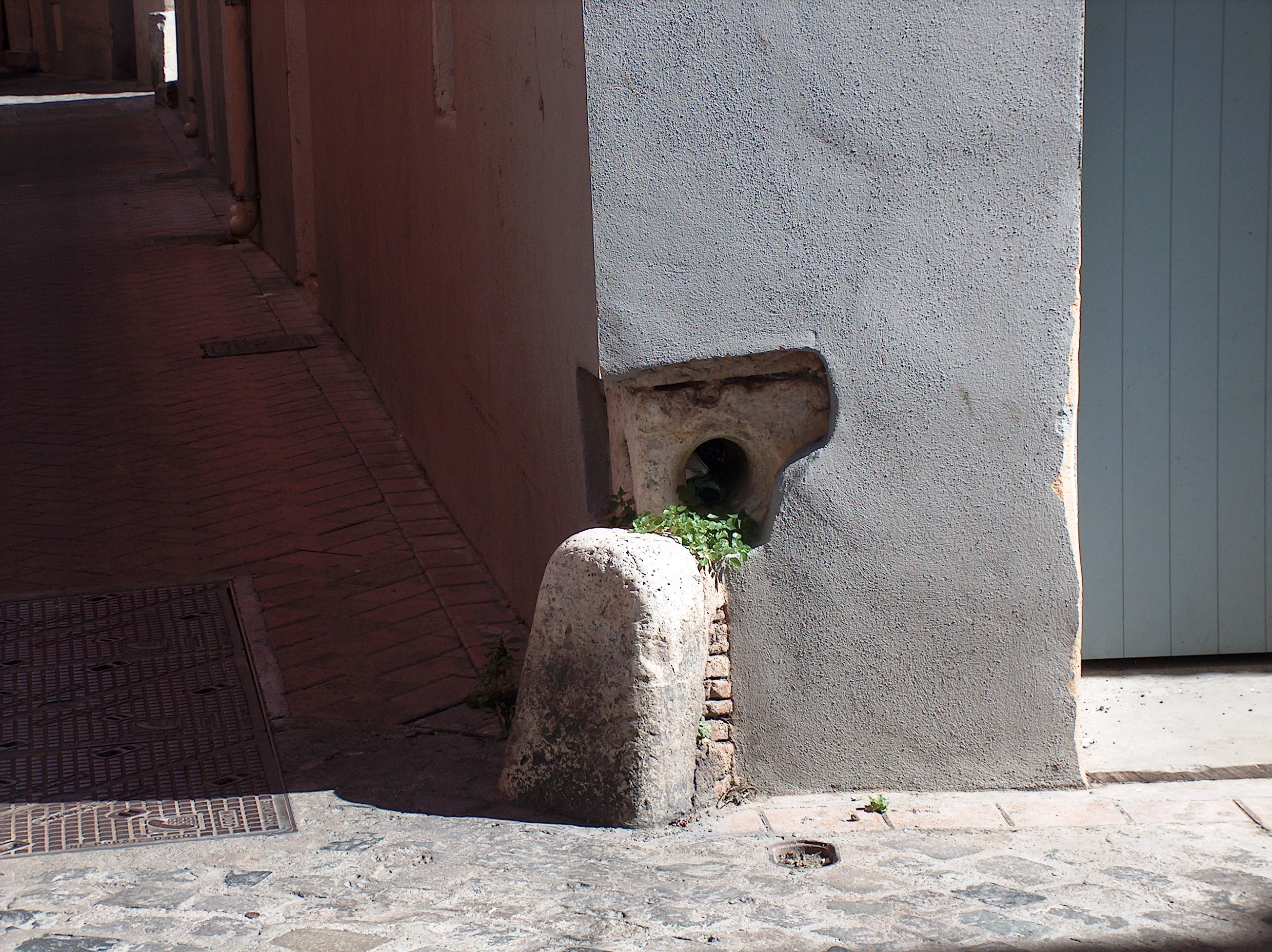 angle rue de la Pierre Trouée et de la rue du Four Saint-François. Donne son nom à la rue. Date du 16e siècle.